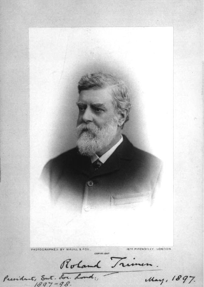 Roland Trimen, entomologist